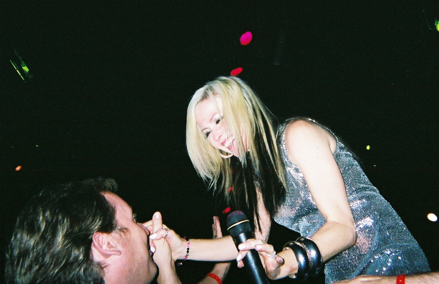 Terri Nunn, cantante de la banda Berlín. Fotografía de Horacio Cambeiro.